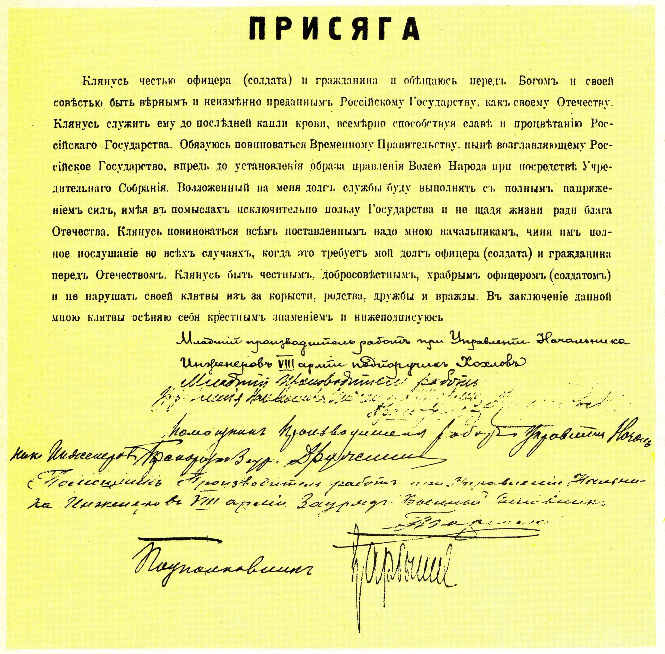 Переприсяга Временному правительству России военнослужащих инженерного корпуса Русской Императорской армии (Управления начальника инженеров VIII русской армии). Последней стоит подпись подполковника Дмитрия Карбышева. Весна 1917 года.